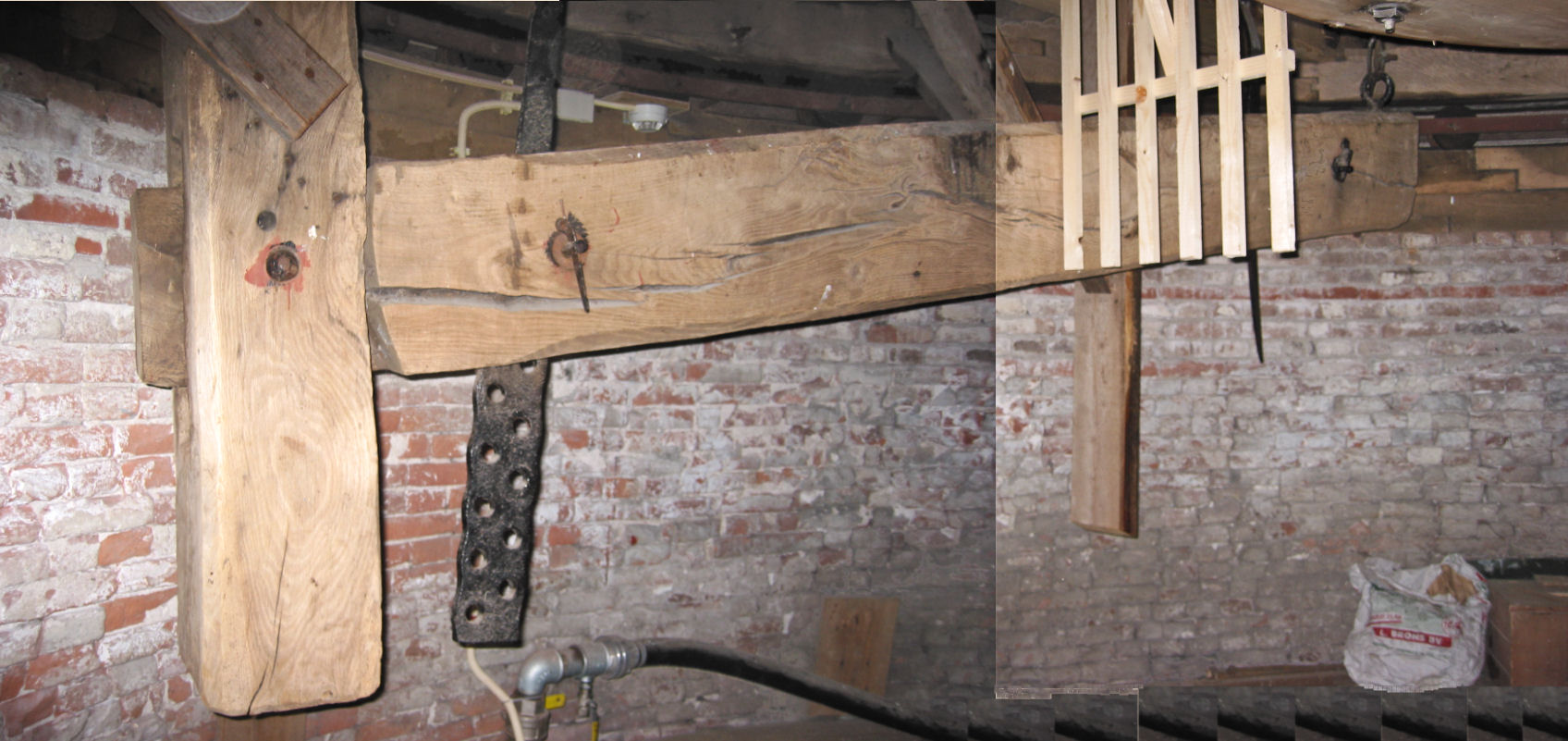 Vangbalk van De Hoop in Garderen, Gelderland, the Netherlands